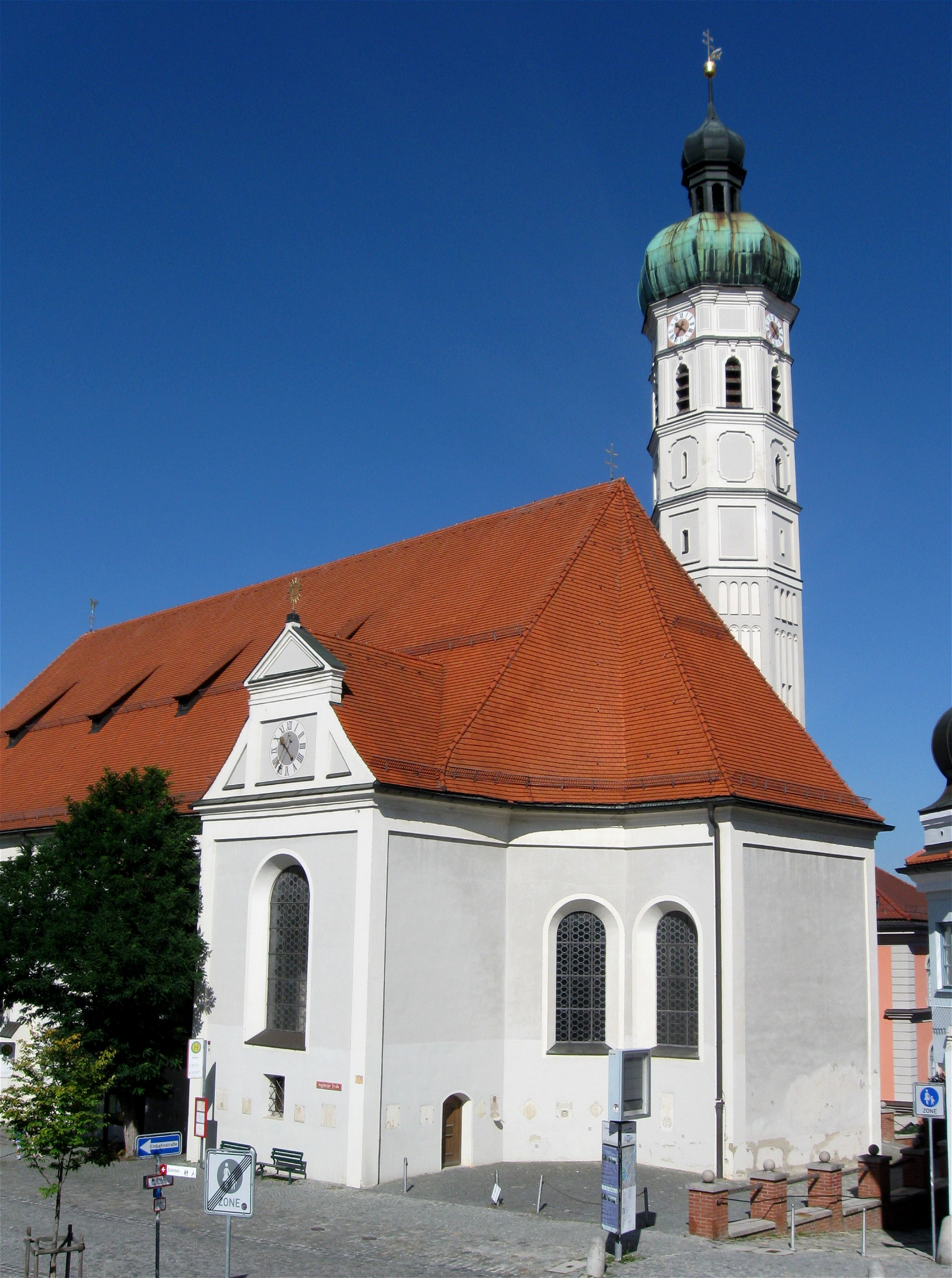 Stadtpfarrkirche St. Jakob, Dachau